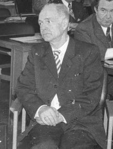 Im Rahmen einer Feierstunde verleiht die Ratsversammlung den mit 5.000 DM dotierten Wissenschaftspreis an Dr. Brigitte Schubert- Riese (Bildmitte, helles Köstüm) für ihre Dissertation zum Thema " Das literarische Leben in Eutin im 18. Jahrhundert". Im Bild v.l.n.r.: Oberbürgermeister Günther Bantzer, Prof. Dr. Wilhelm Kewenig (Rektor CAU), Brigitte Schubert-Riese, Prof. Dr. Erich Trunz.